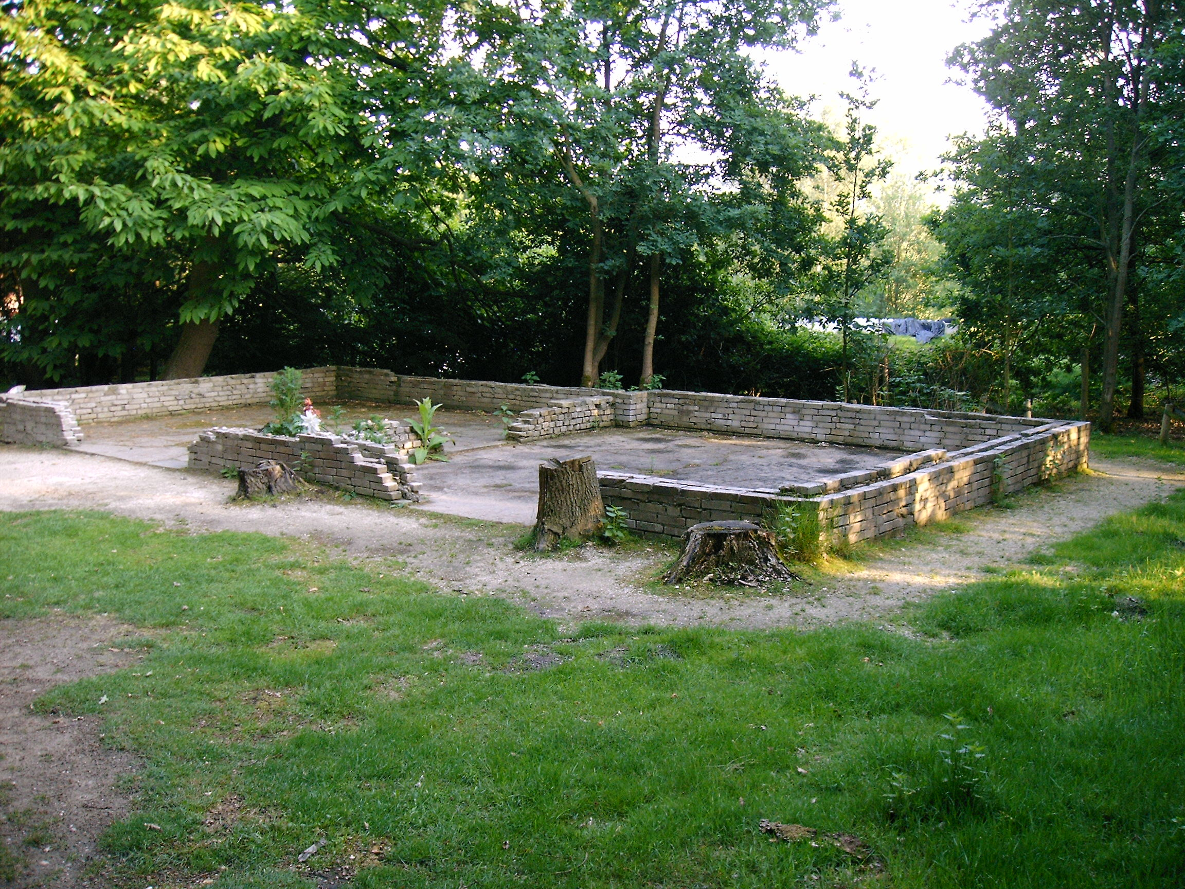 Kamp Amersfoort, Restanten van een lijkhuis